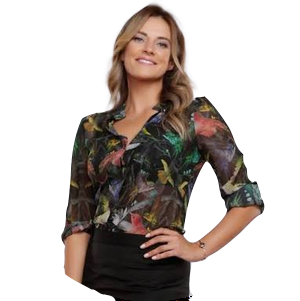 Profil fotoğrafı